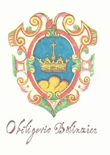 Angebliches Wappen des Dogen Obelerius